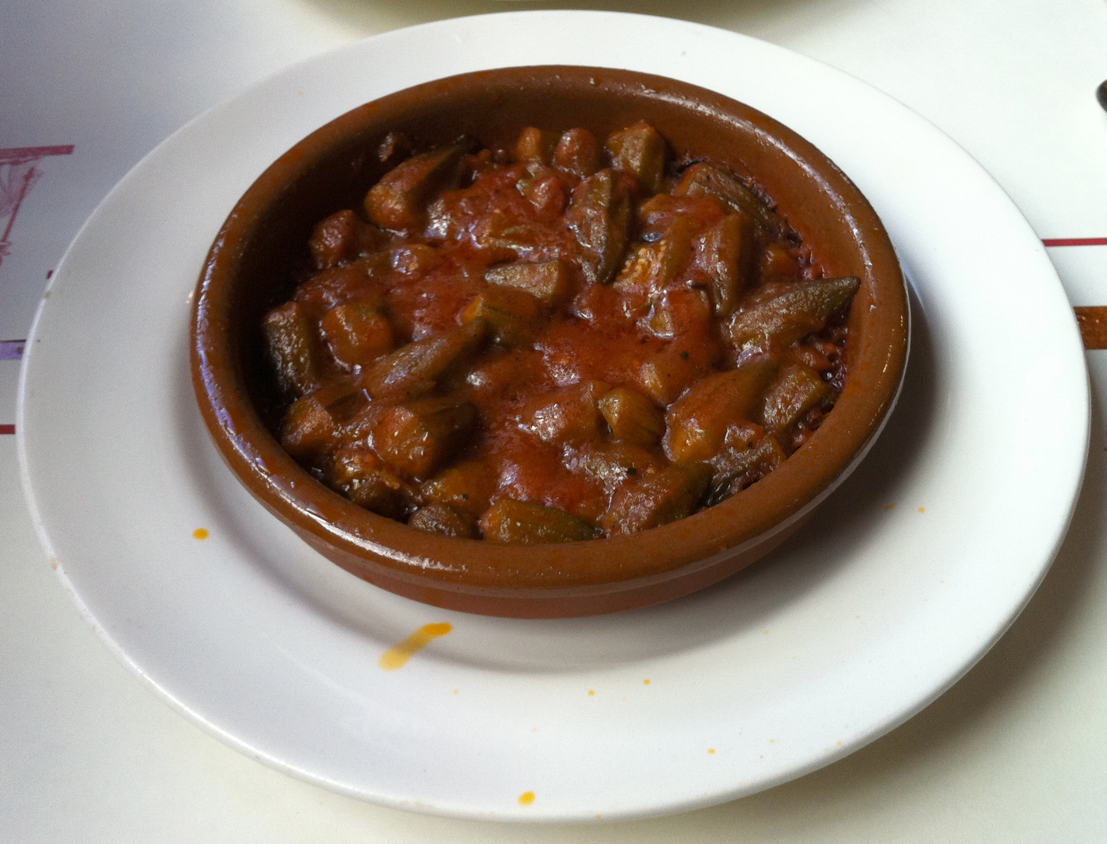 Bamia (Guiso de Ocras con salsa de tomate).